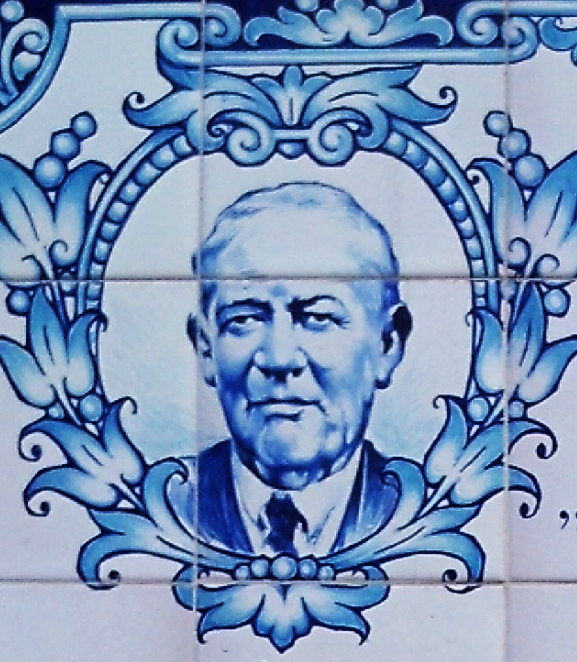 Azulejo dedicado al cantaor, guitarrista flamenco y escritor Fernando "el de Triana". Calle Pureza. Sevilla, Andalucía, España. This file was derived from: Fernando "el de Triana".jpg